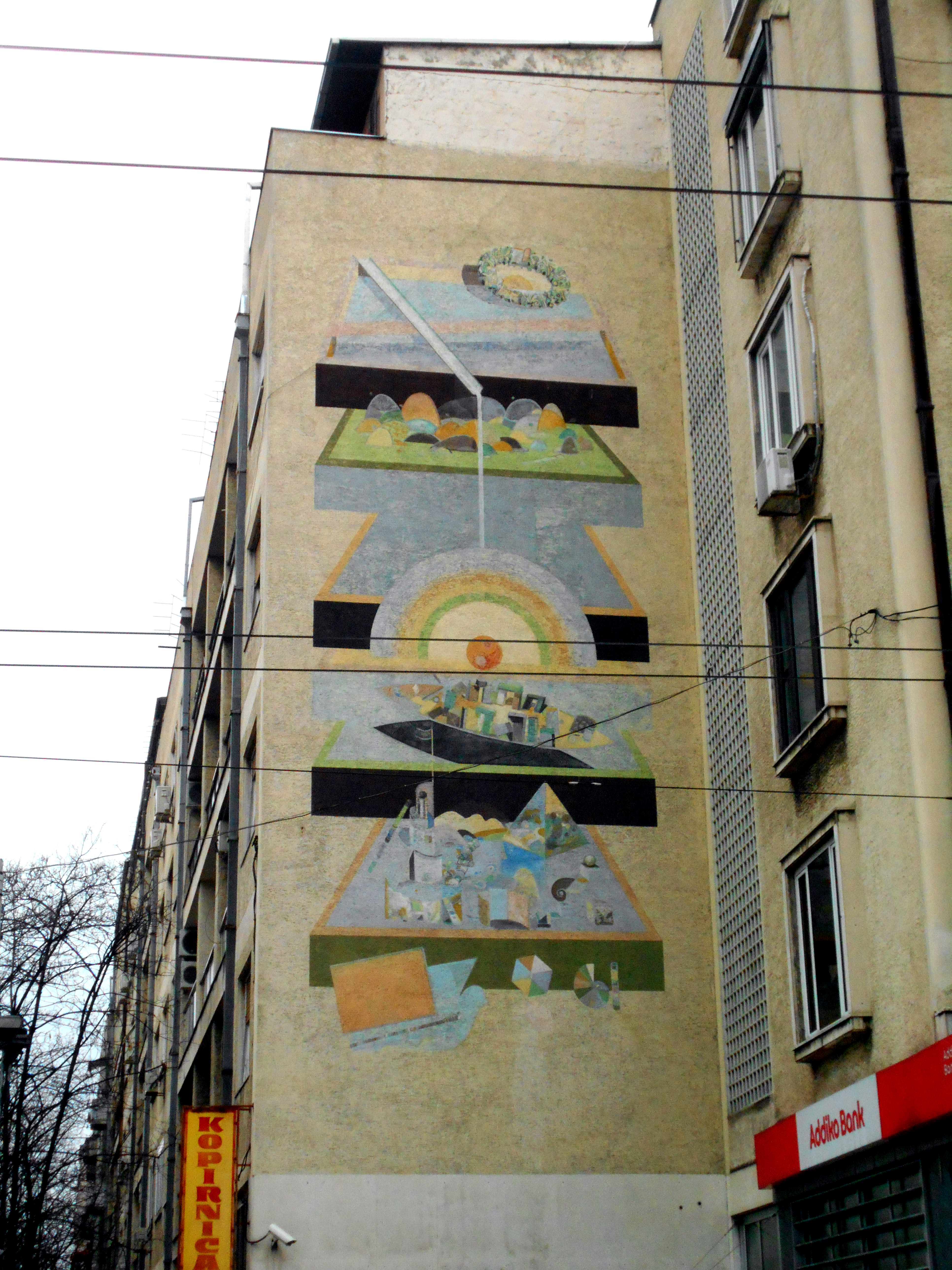 Mural u ulici Vase Čarapića, na uglu sa Zmaj Jovinom